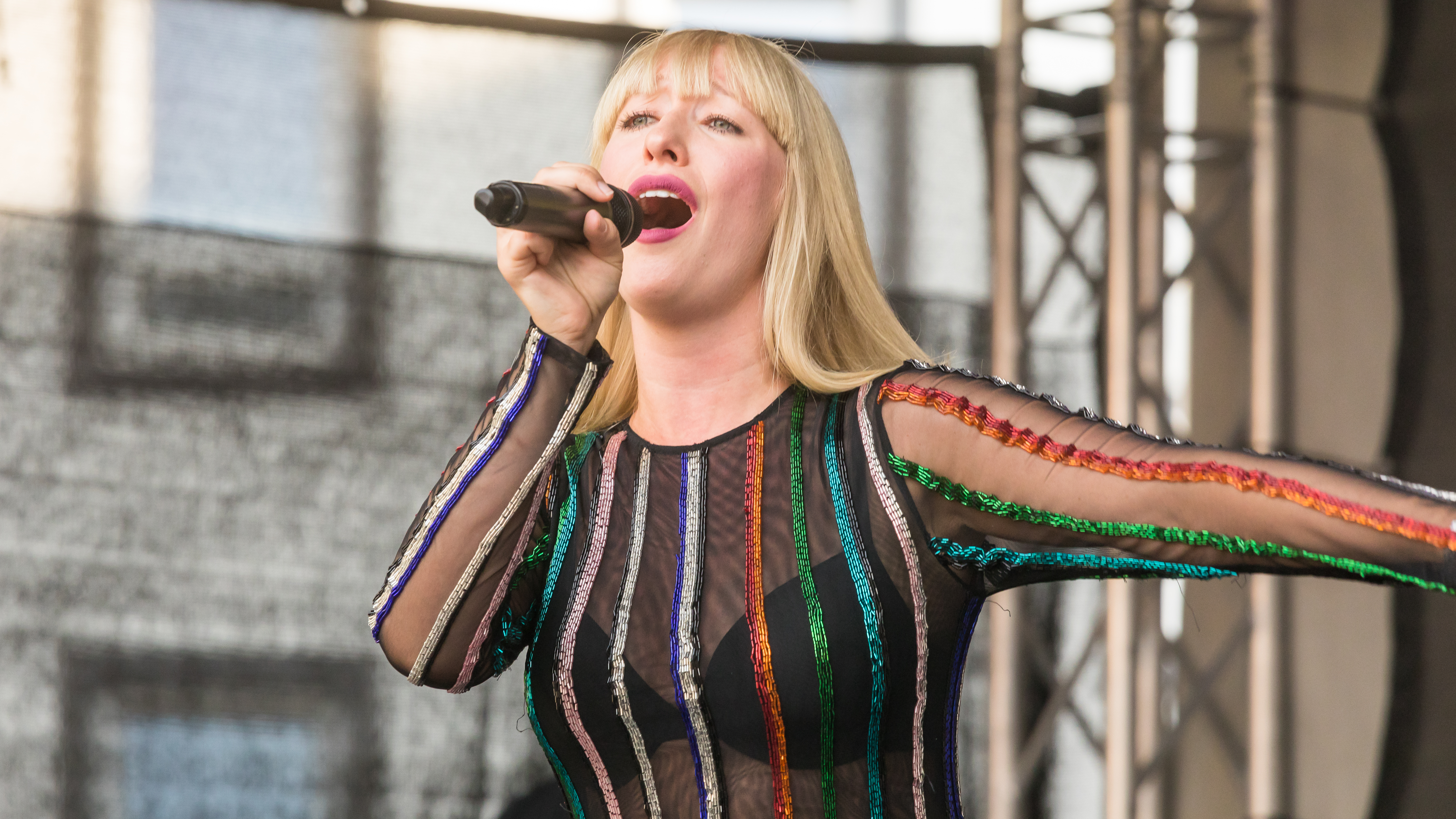 ColognePride/CSD 2018 - Auftritt von Kery Fay auf der Hauptbühne, Heumarkt